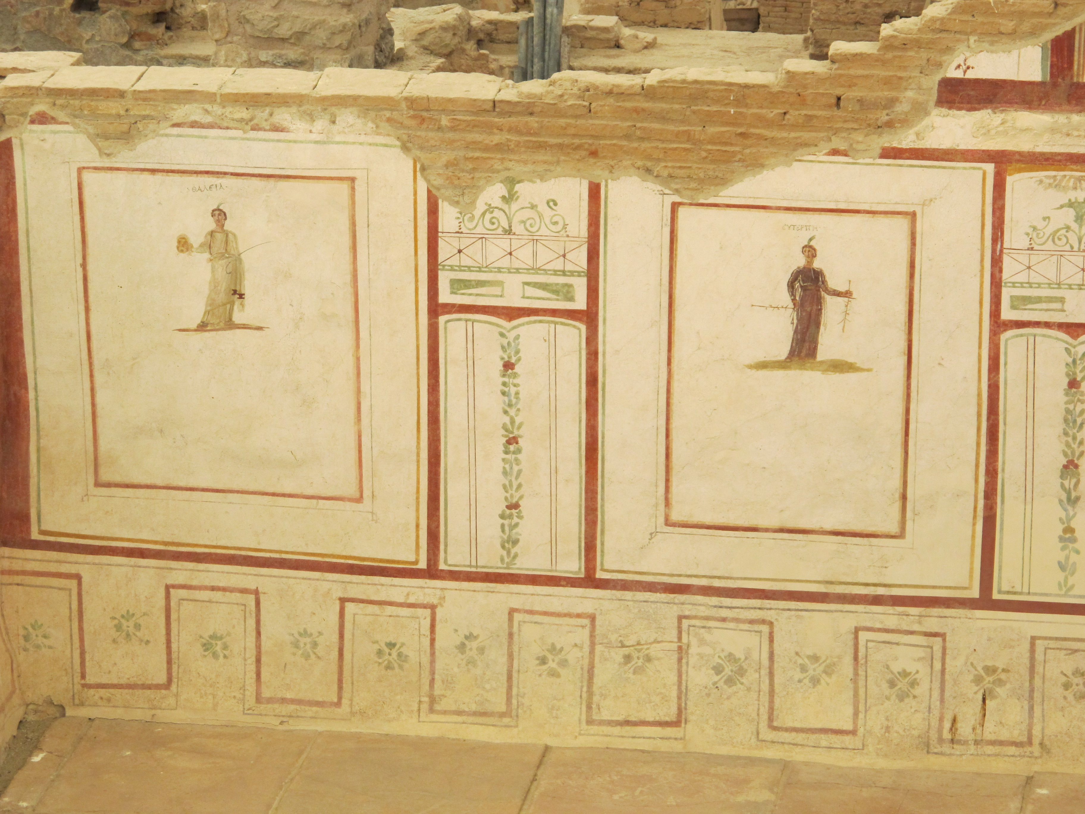 Efeso, case sulla collina